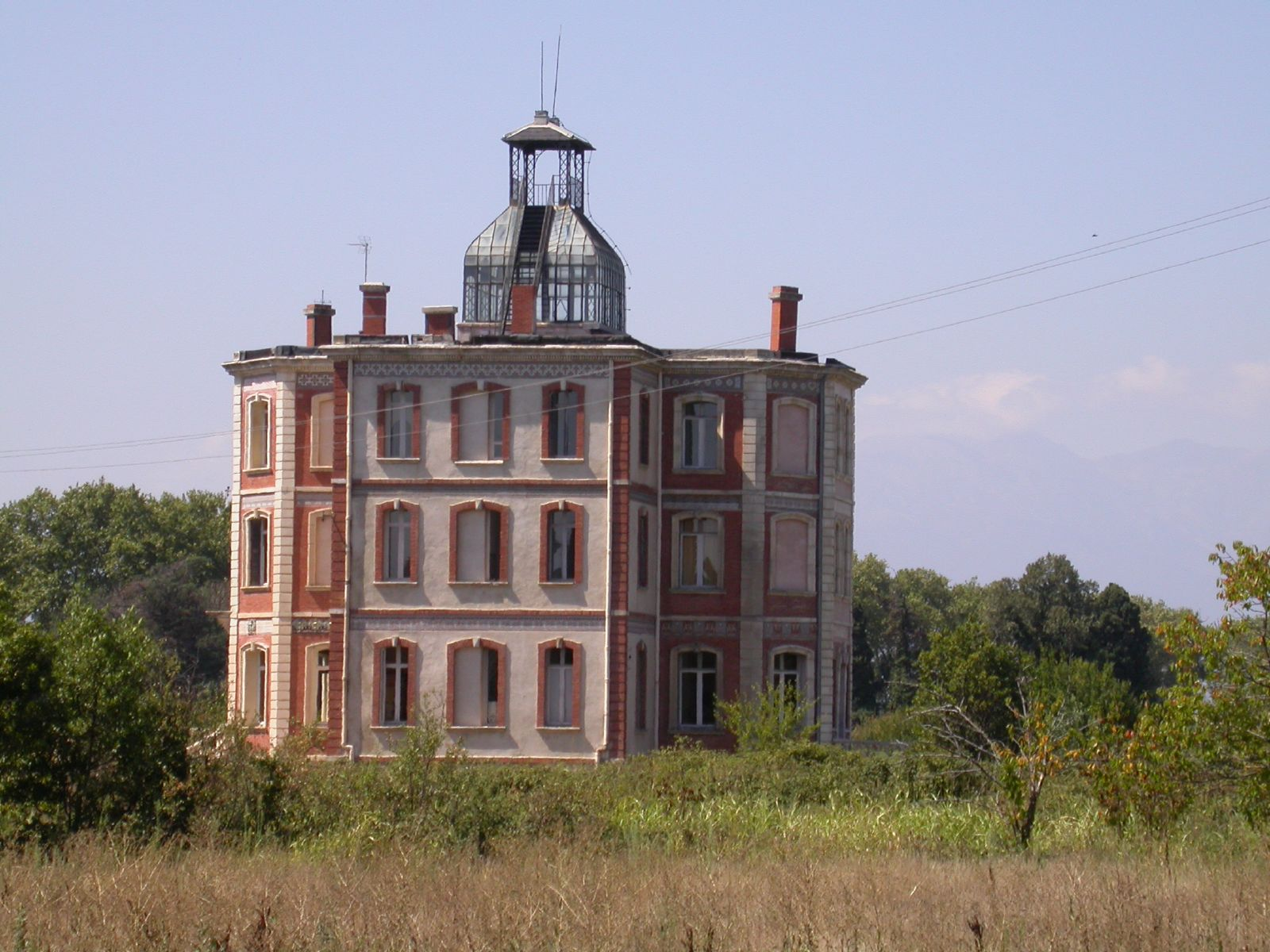 Edifici que serví de maternitat per les exiliades espanyoles després de la Guerra Civil. Elna. Rosselló